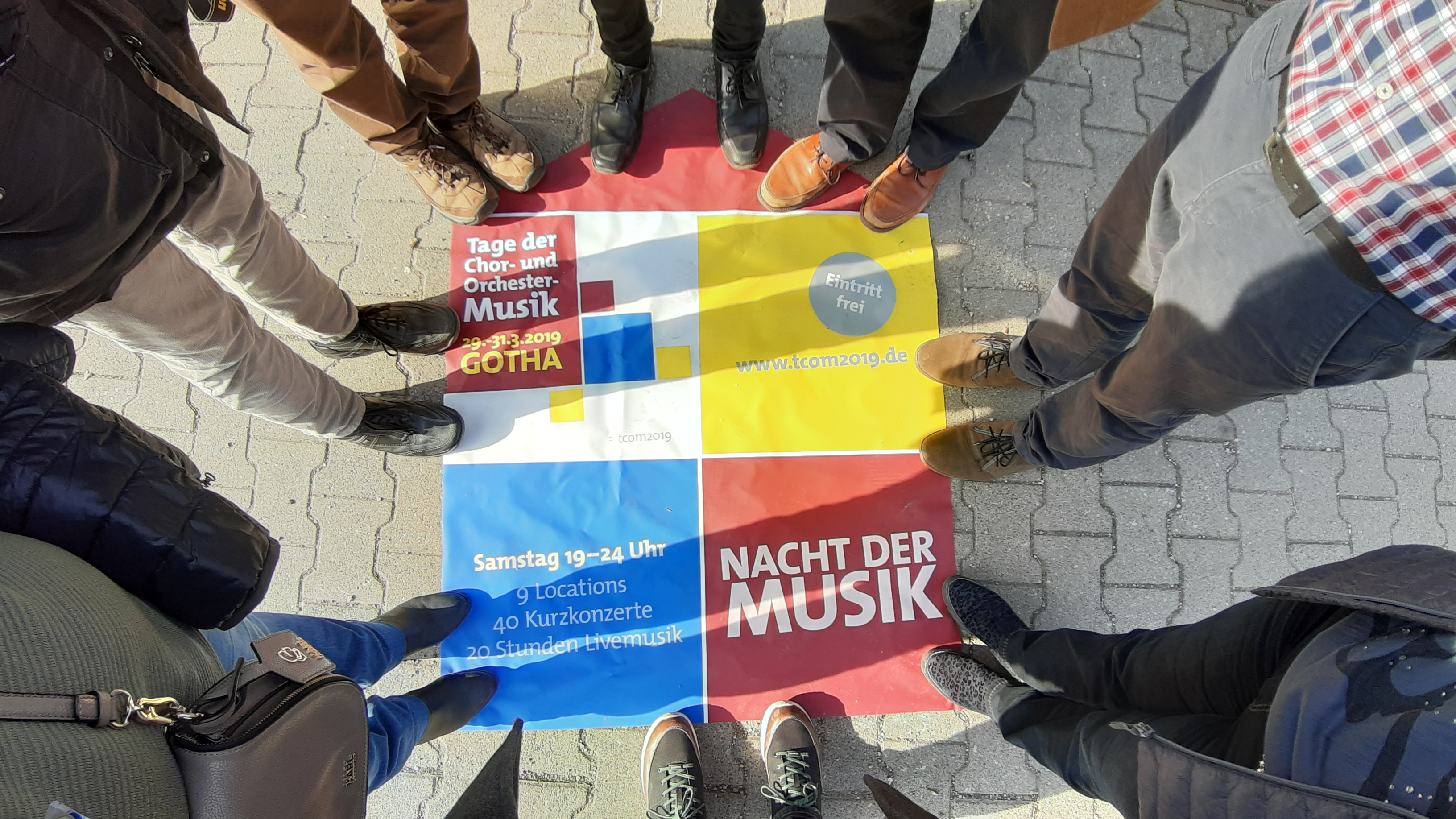 Der Synagogalchor Hannover vor seinem Konzert auf den Tagen der Chor- und Orchestermusik 2019 in Gotha vor der Kirche St. Bonifatius